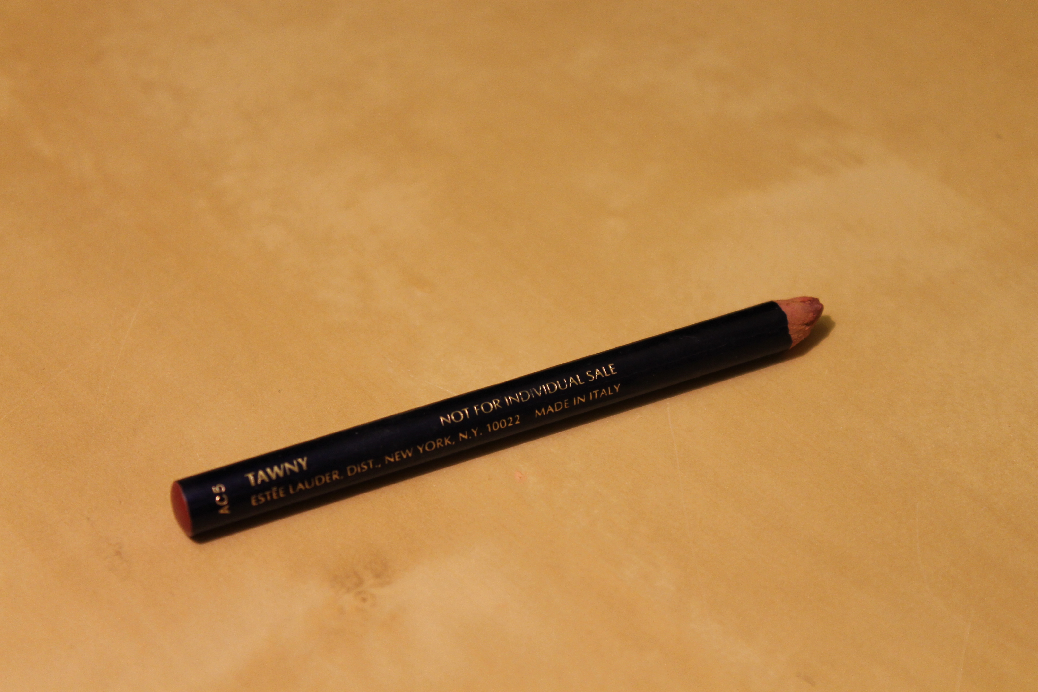 Lipliner